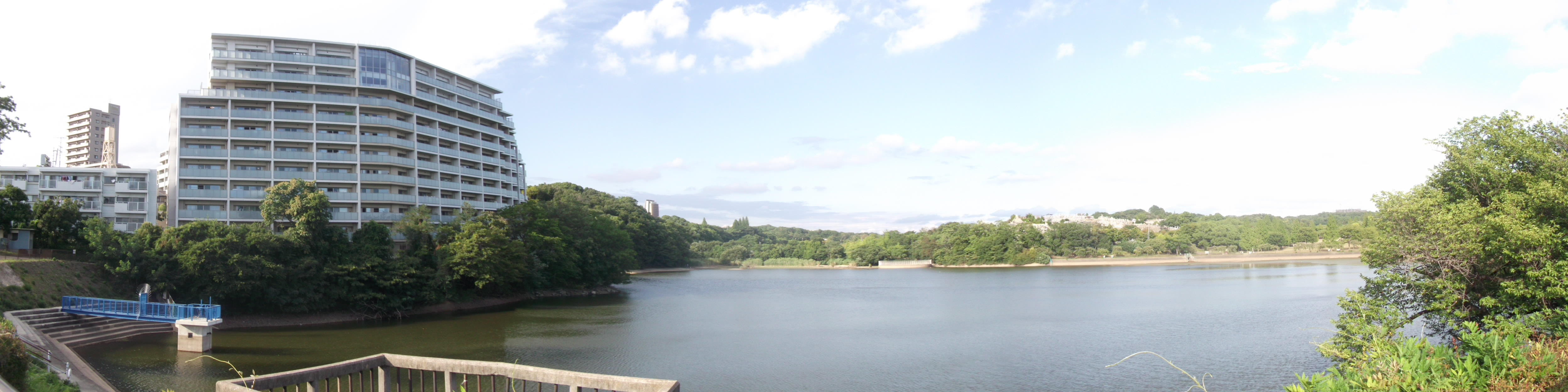 名古屋市千種区の猫ケ洞池を西側より撮影。カメラのパノラマ機能により現地にて3枚の画像を合成。左側に集合住宅、奥に平和公園の墓地が写る。